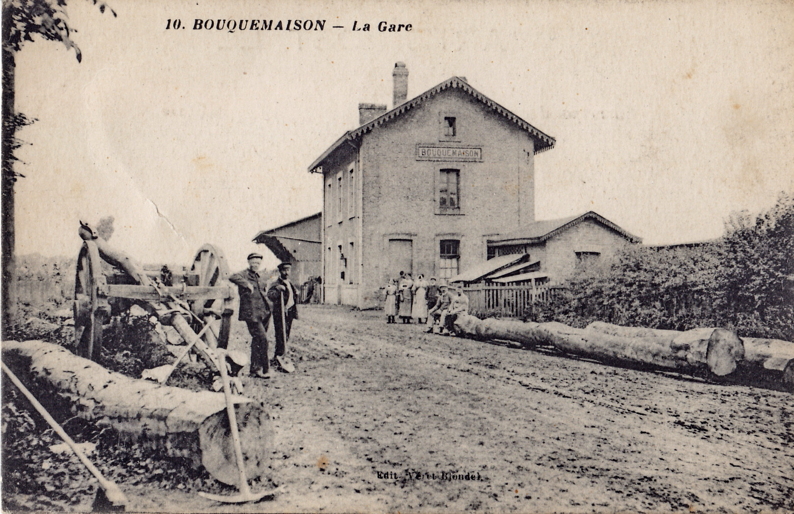 Carte postale ancienne éditée par Veuve Blondel, n°10 : BOUQUEMAISON - La Gare